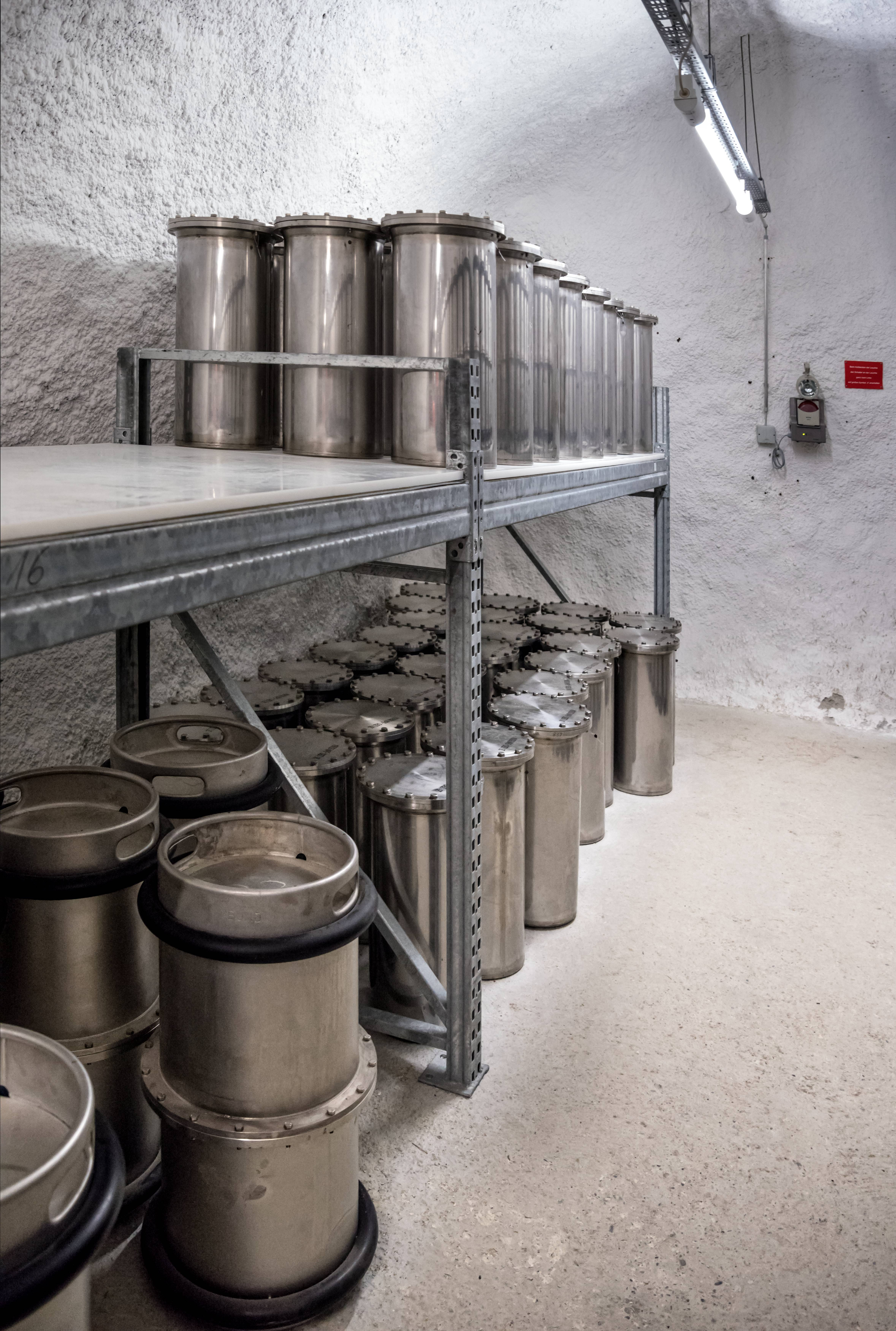 Der Barbarastollen ist der Zentrale Bergungsort der Bundesrepublik Deutschland zur Lagerung von fotografisch archivierten Dokumenten mit hoher national- oder kulturhistorischer Bedeutung. Er ist in Europa das größte Archiv zur Langzeitarchivierung. Die Bilder sind im Rahmen einer Führung des Bundesamts für Bevölkerungsschutz und Katastrophenhilfe (BBK) entstanden - Wikipedia Stammtisch,das 113. Treffen am 30. Mai 2016 Die 50 Behälter der "Subduktive Maßnahmen ZBO - SdM 052004". Es wurden Werke von 50 Künstlern eingelagert Diese sind auch die einzigen Behälter die auch verplomt sind. Sie dürfen in 1500 Jahren also im Jahre 3504 eingesehen werden.